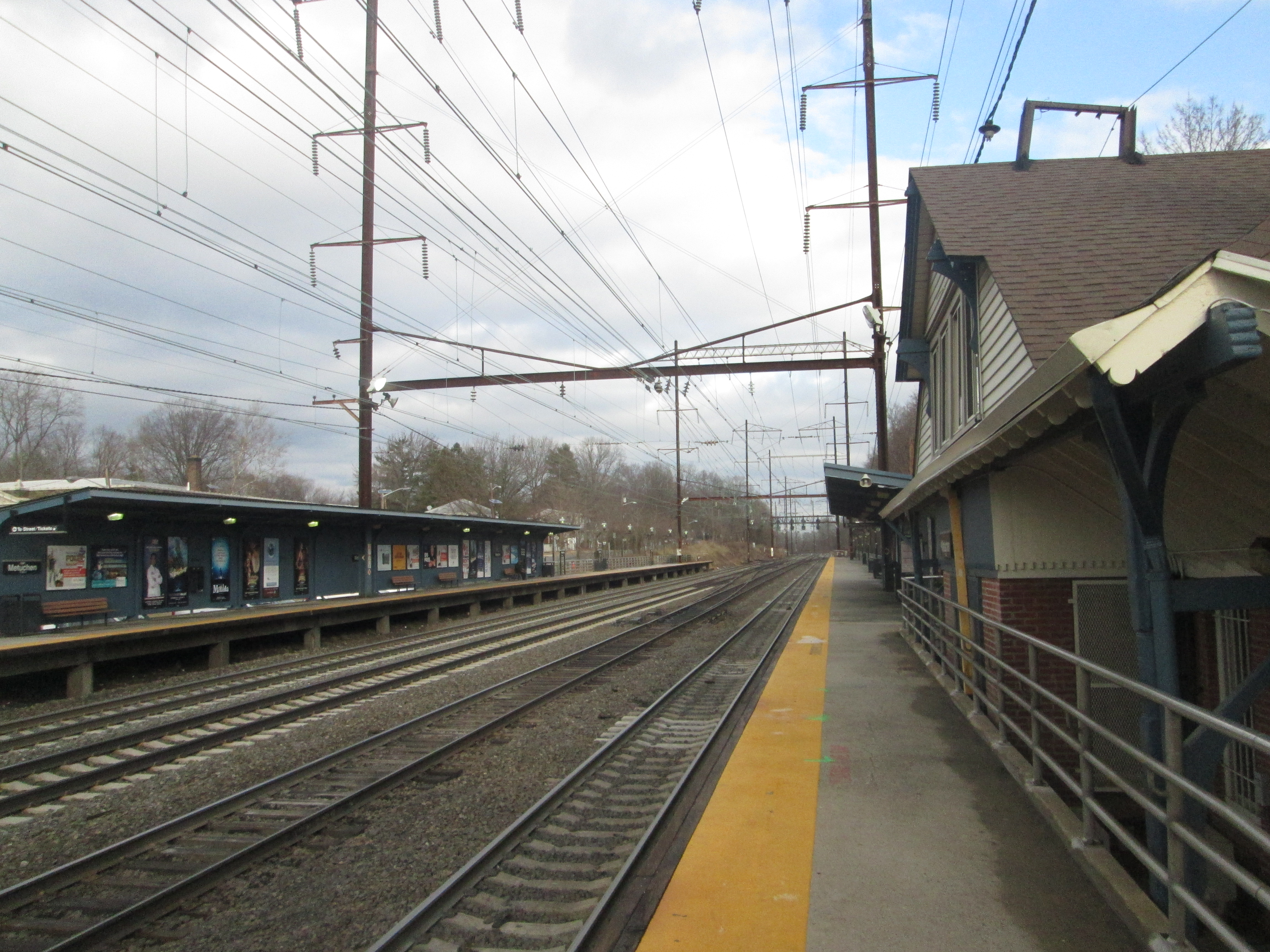 Metuchen, New Jersey